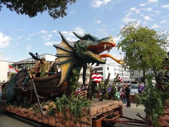 Дракон с праздничного шестия на Бакфишфесте